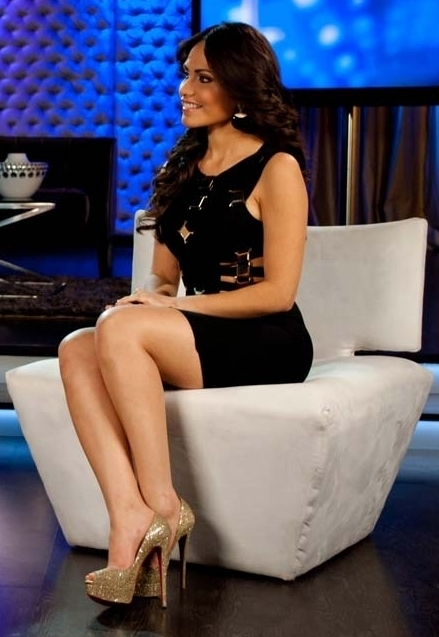 Jenny Blanco, presentadora de televisión dominicana.